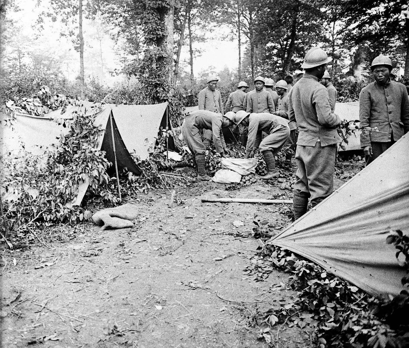 Campement d'Indochinois dans le bois Waly près de Fleury-sur-Aire (Meuse). 25 juin 1916. Guerre 1914-1918.